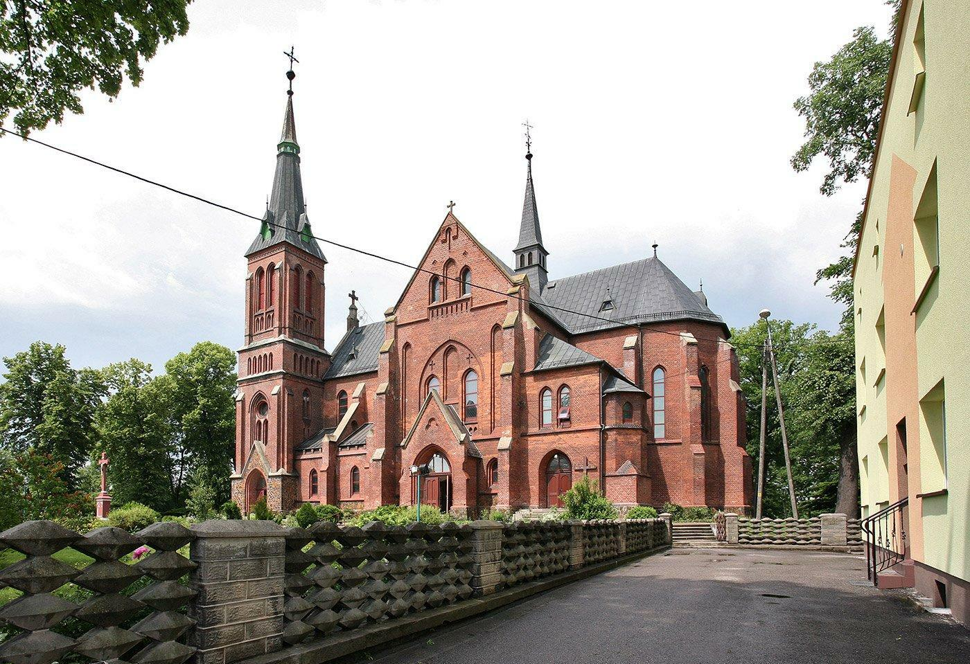 Sporej wielkości kościół wzniesiony w 1894-95 r. z cegły w stylu neogotyckim. Świątynia zbudowana jest na planie krzyża. Posiada nawę główną, dwie boczne oraz transept – nawę poprzeczną. W czasie wojny (w 1945 r.) kościół nieco ucierpiał. Trafiły w niego 23 pociski artyleryjskie. Uszkodzony został dach, mury, filary, okna. Naprawy dokonano w 1949 r. Widać miejsca napraw, są różnice w odcieniu cegły.